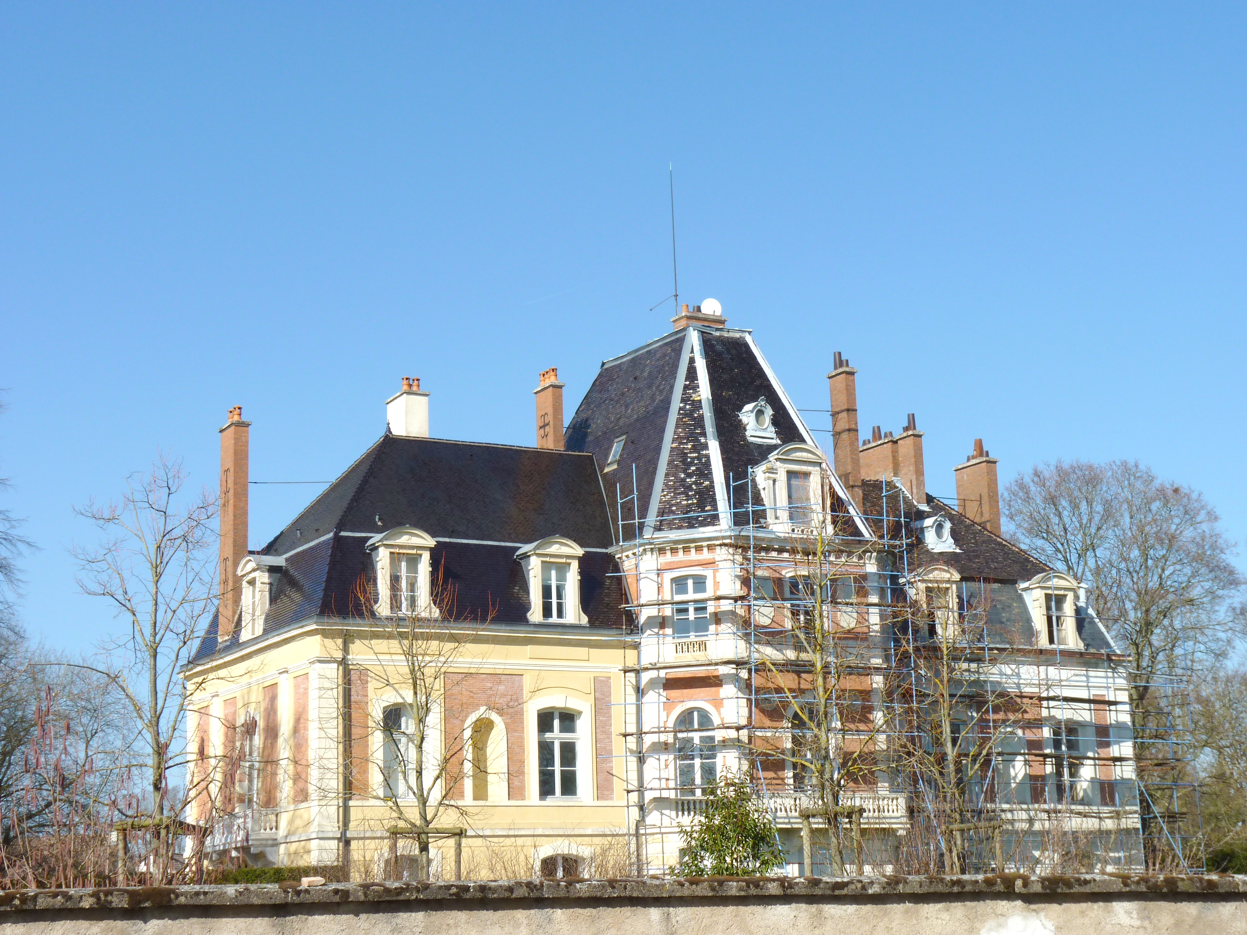 Château d'Aiserey (Côte d'Or, Bourgogne, France)